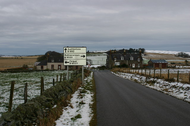 Badenscoth, Aberdeenshire